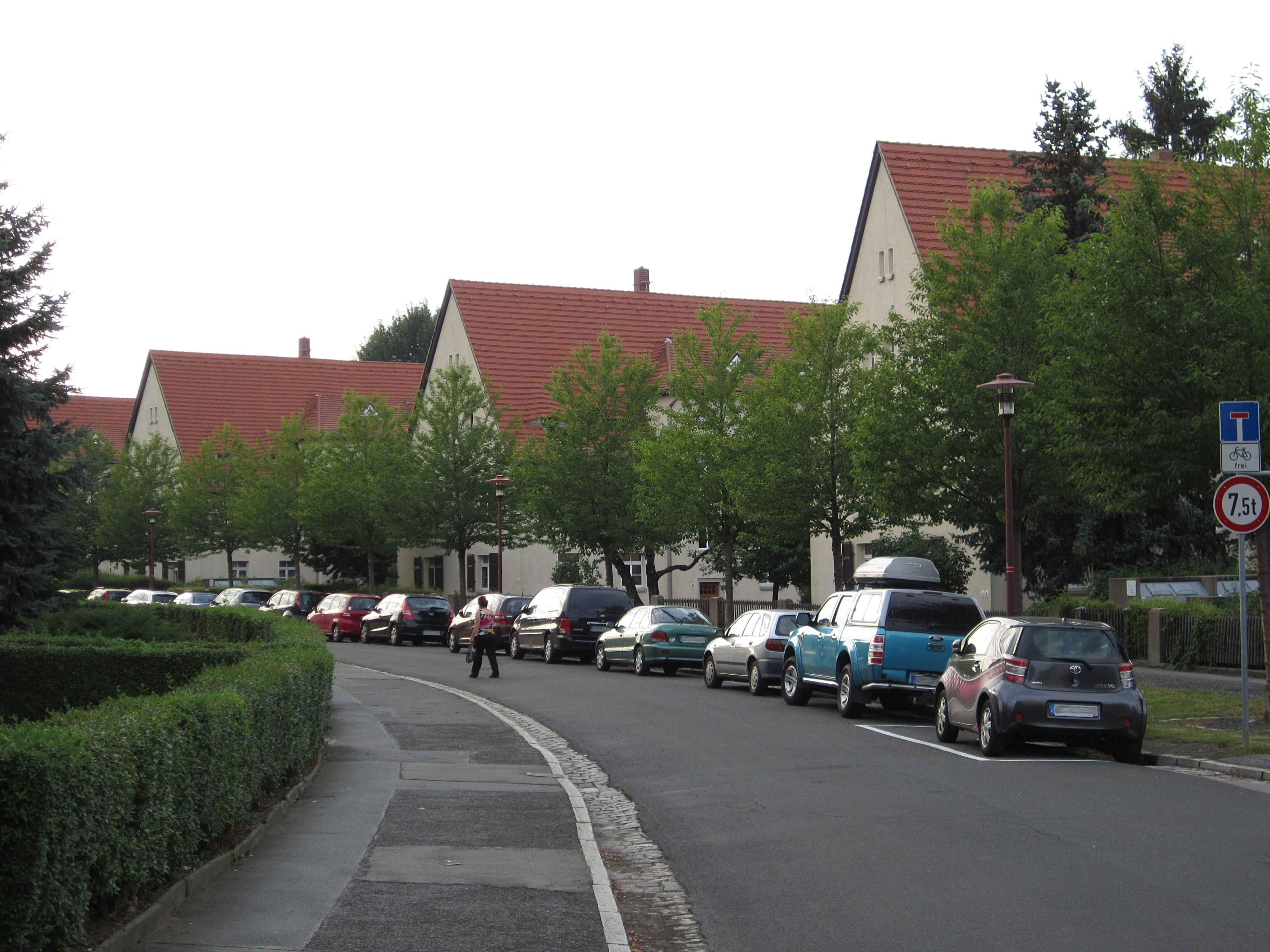 Siedlung Zschonerallee, Häuser 6-8, 10-12, 14-16 - Teil des Denkmalschutzgebiets Eigenheimsiedlung Briesnitz.